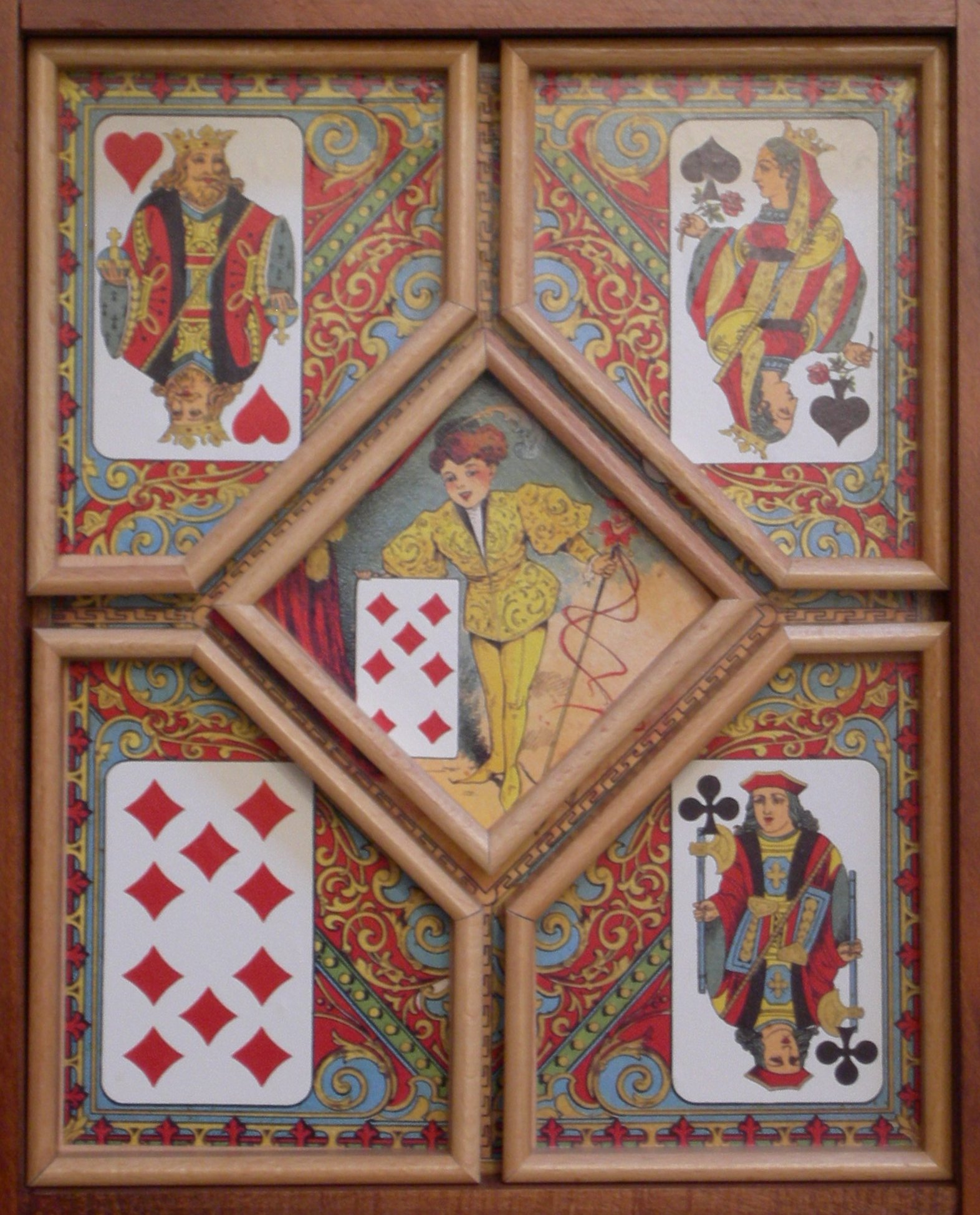 Yellow dwarf game board